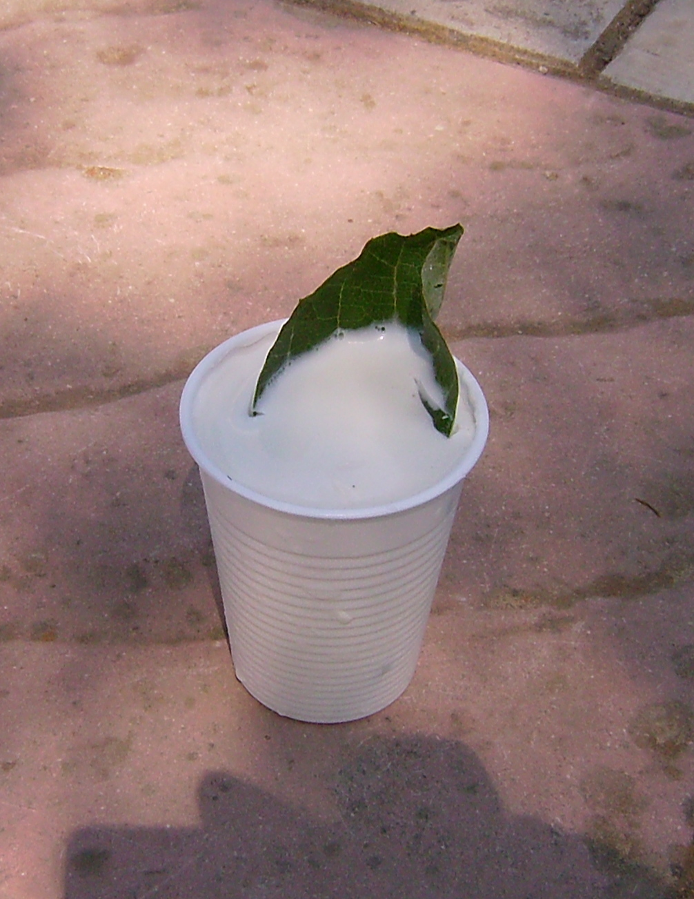 Pampanella cheese